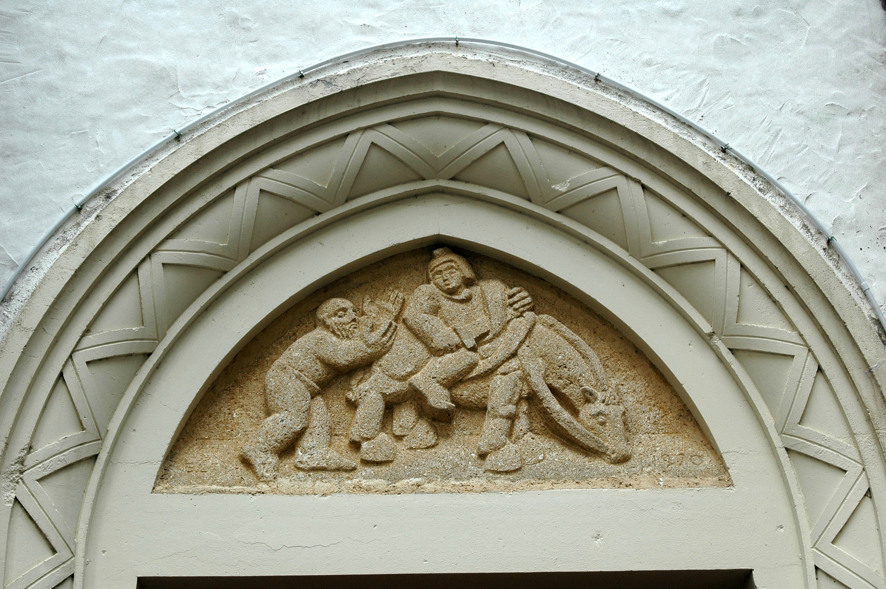 Larressore, détail du fronton de l'église. Photo prise le 08/08/06 par Harrieta171